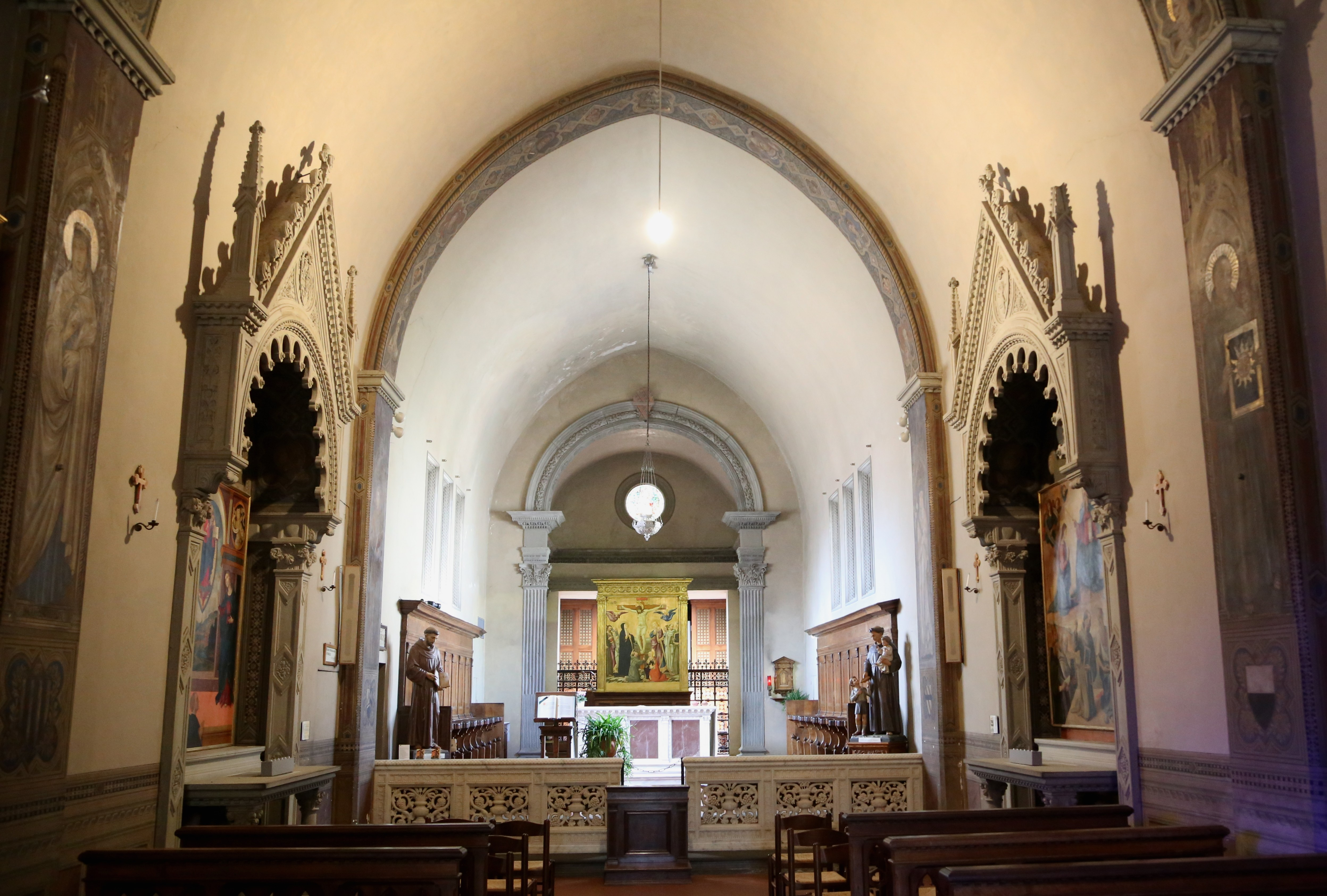 San Francesco, Fiesole